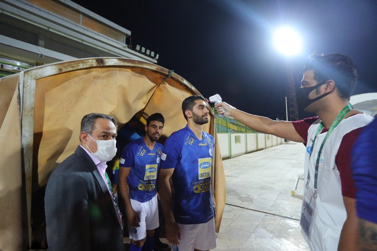 تصاویر دیدار استقلال و صنعت نفت آبادان در چارچوب هفته بیست و پنجم لیگ برتر فوتبال ۹۹-۱۳۹۸ (گزارش بازی)